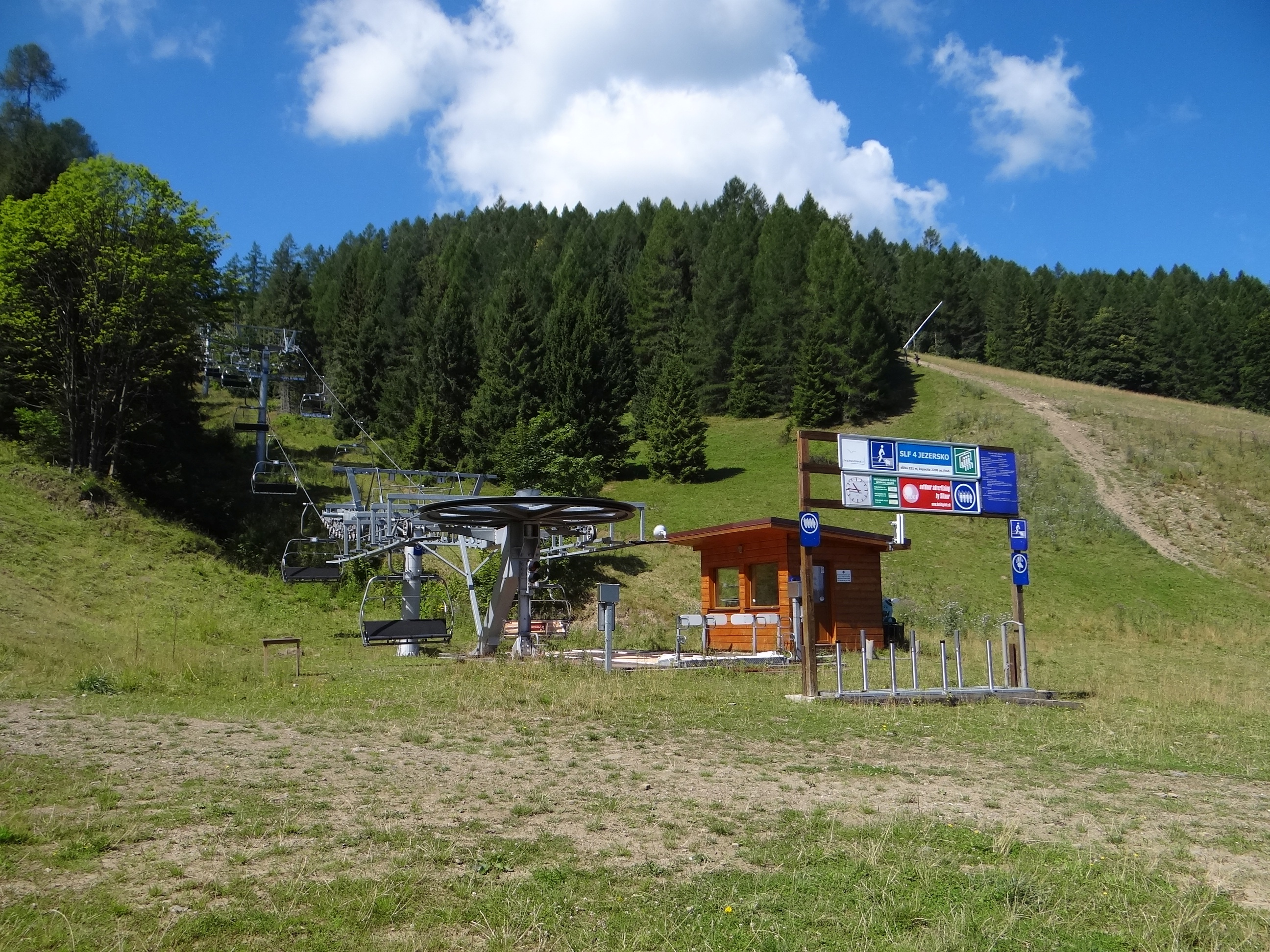 Ski Jezersko